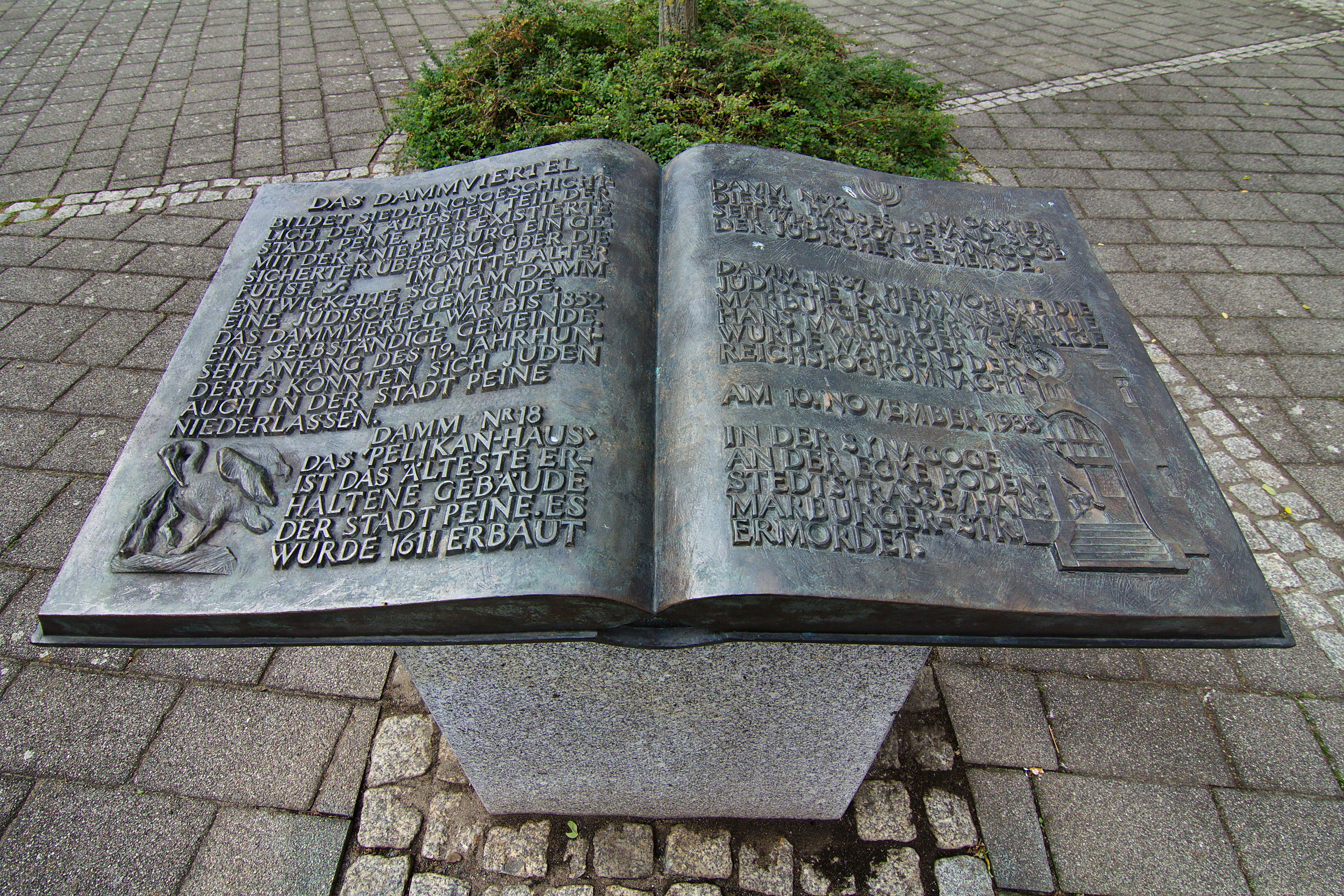 Infoschrift auf Bronzebuch der Stadt Peine, Niedersachsen, Deutschland. Bronzebuch Damm